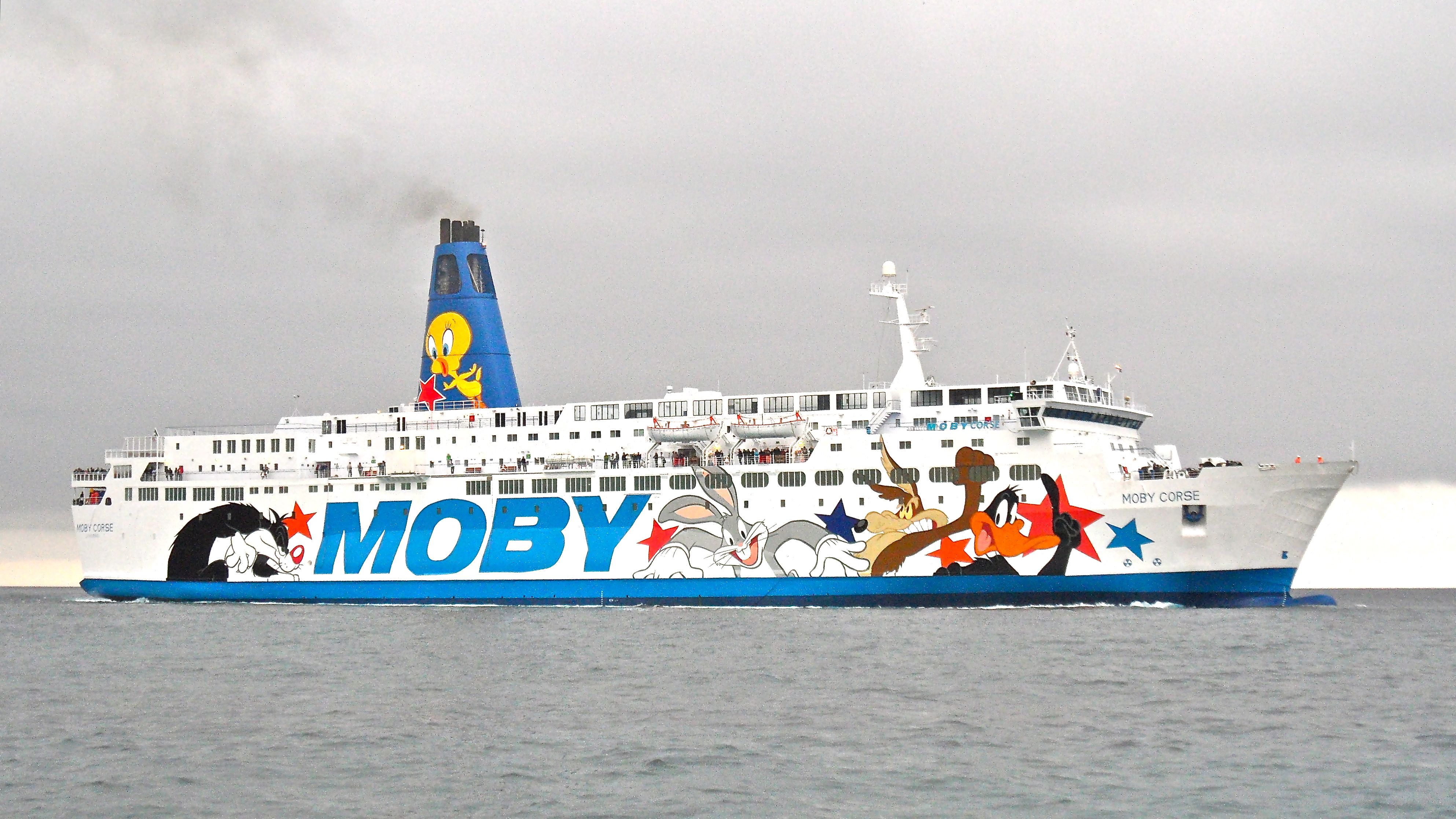 le Moby Corse manœuvrant pour entrer à Bastia